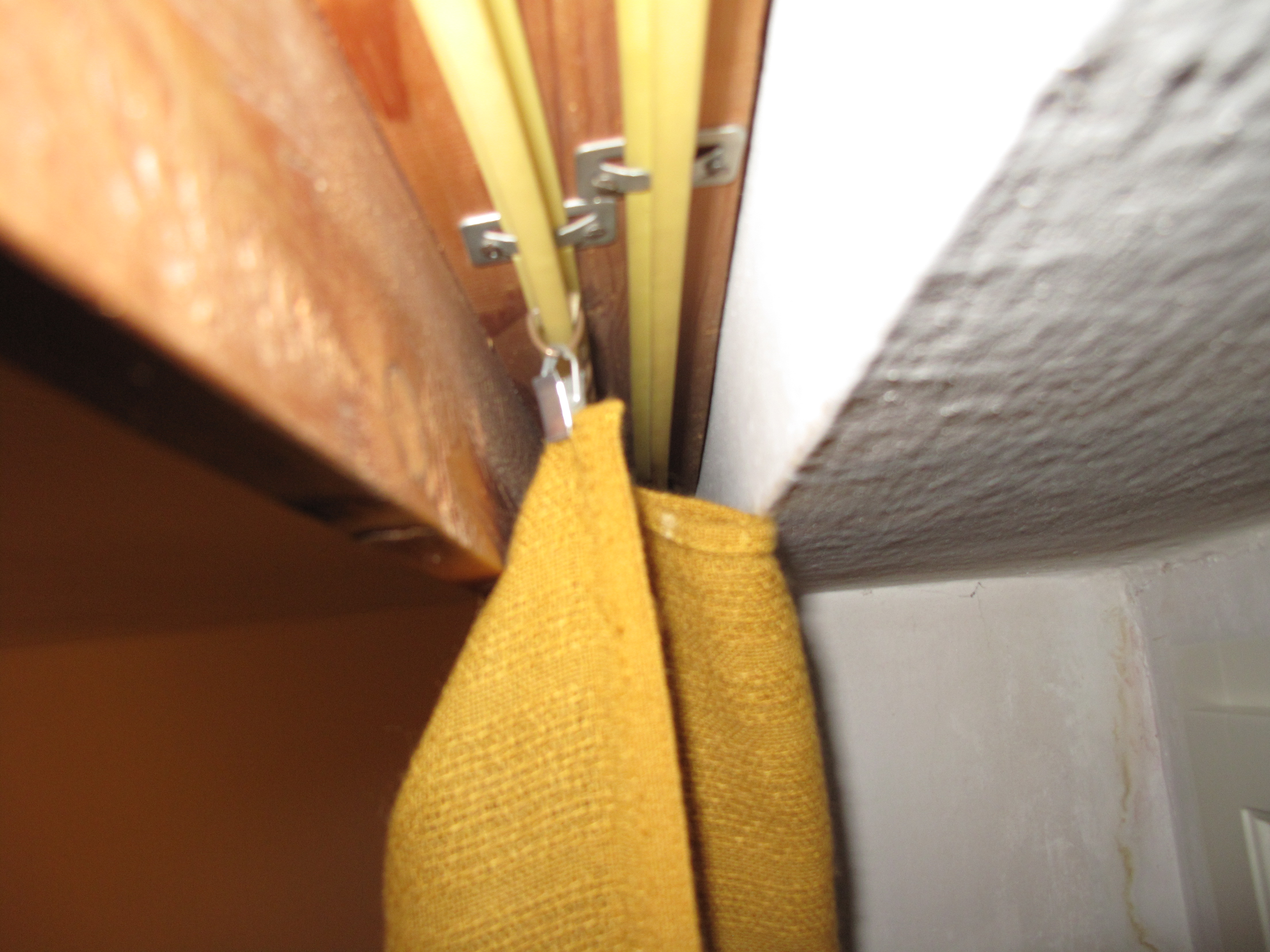 Žlutý závěs.